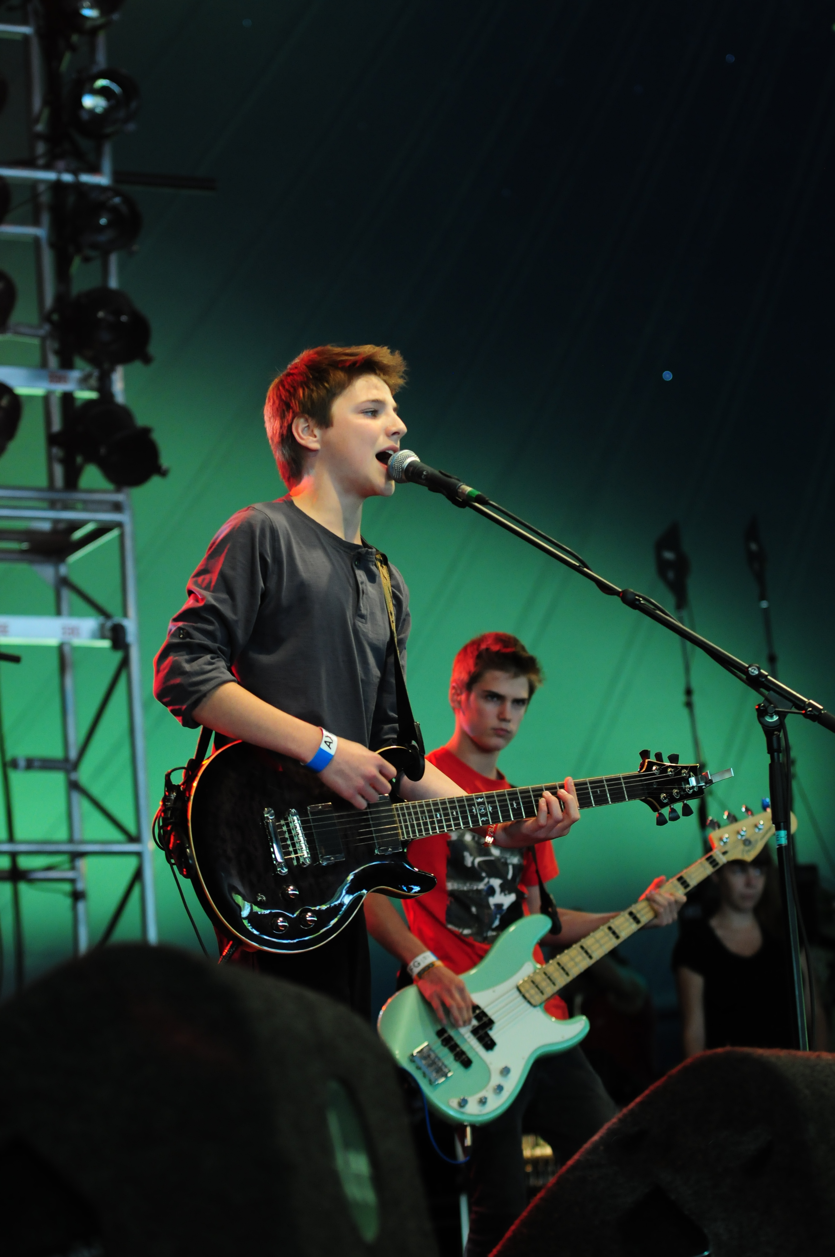 Vlaamse band